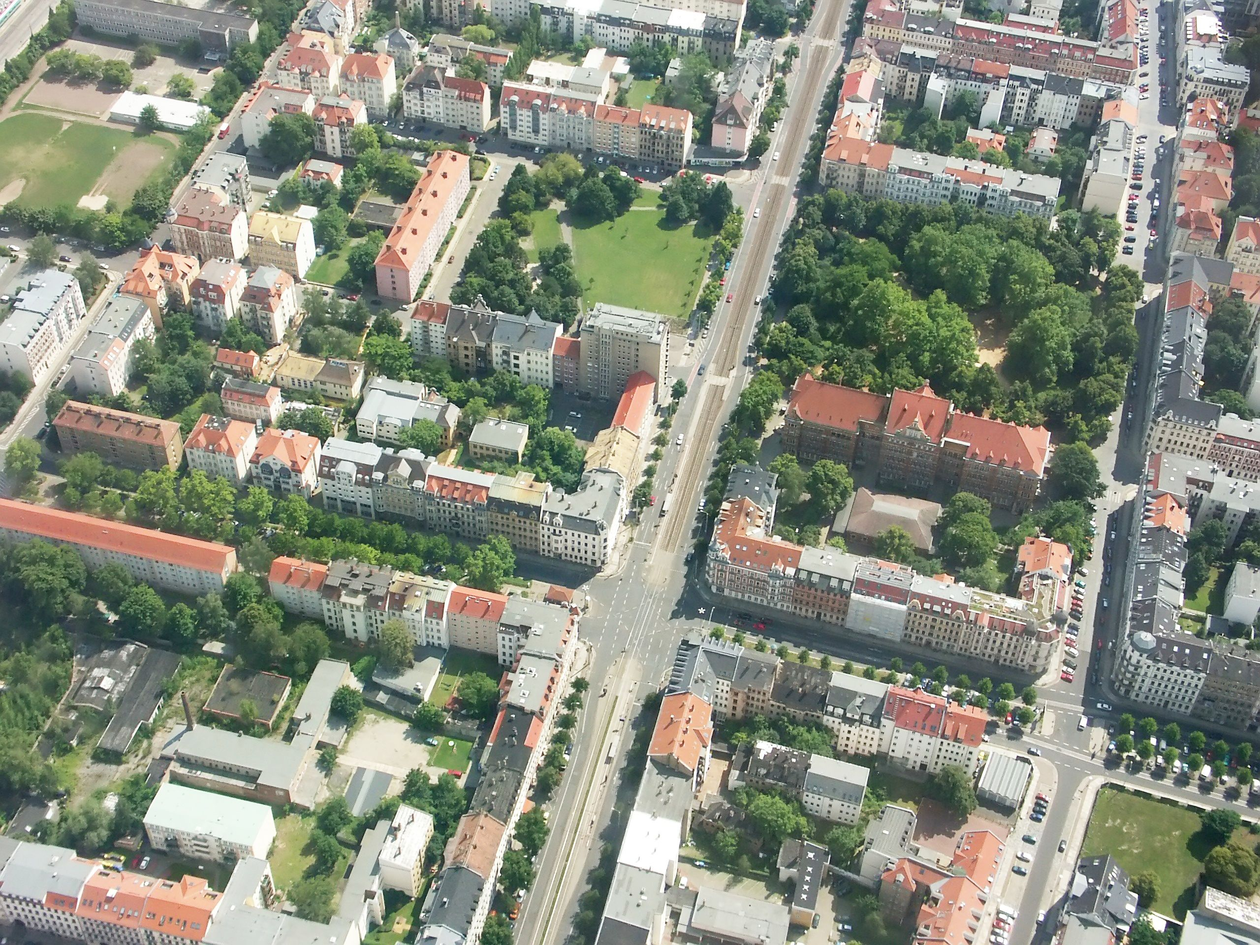 Leipzig Südvorstadt, Kreuzung Kurt-Eisner-/Karl-Liebknecht-Straße, Richtung Connewitz